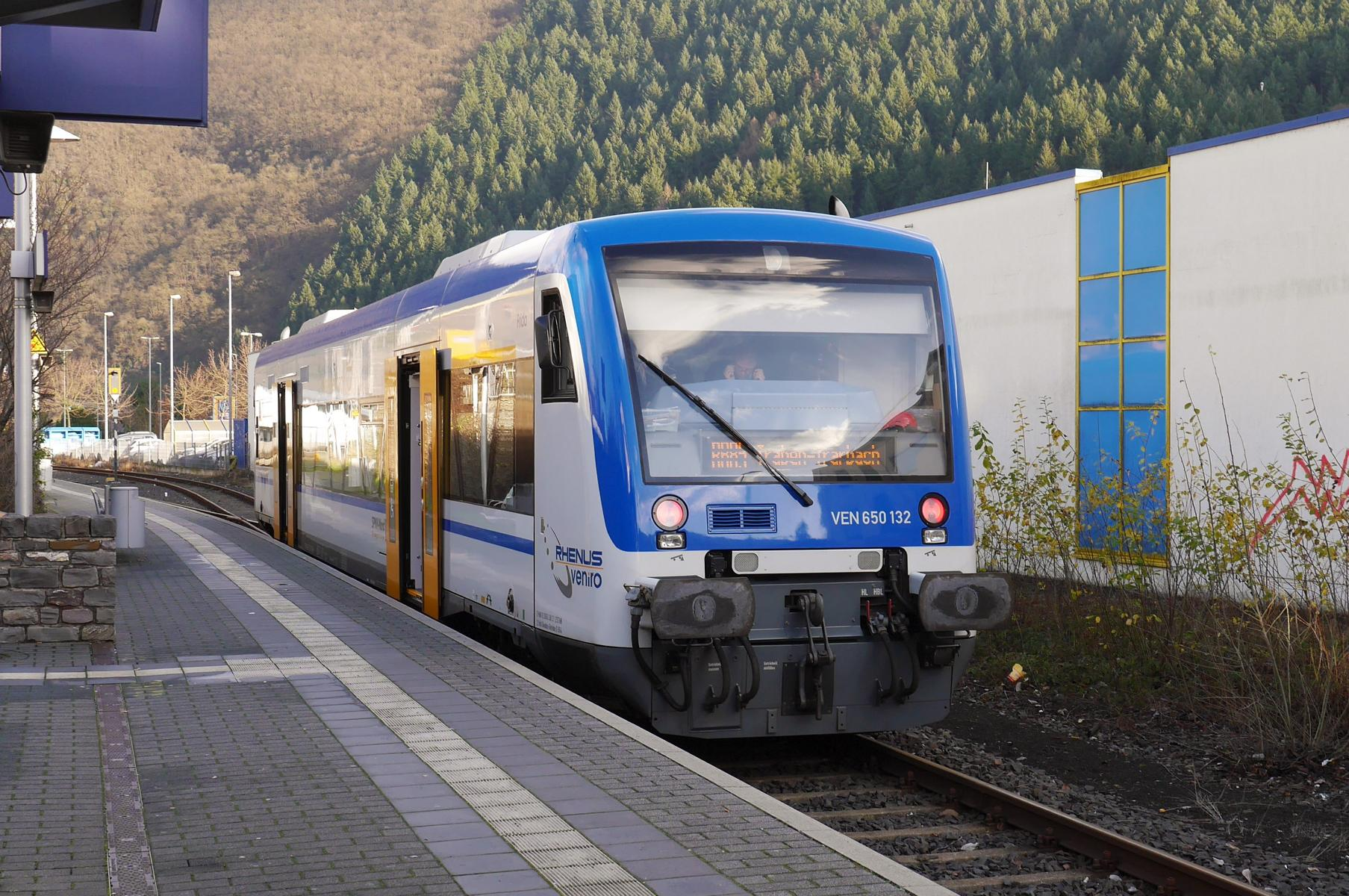 Stadler Regio-Shuttle RS1 von Rhenus Veniro auf der Bahnstrecke Pünderich–Traben-Trarbach